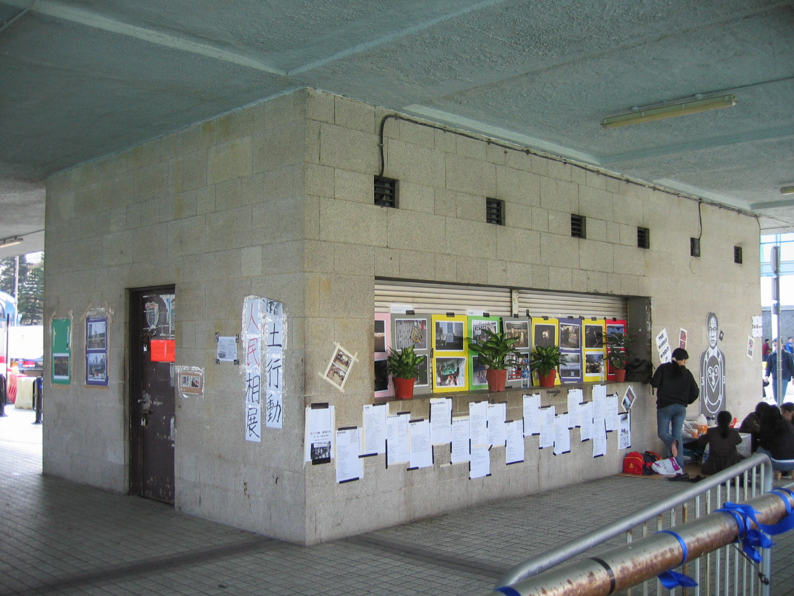 Queen's Pier Snack Bar